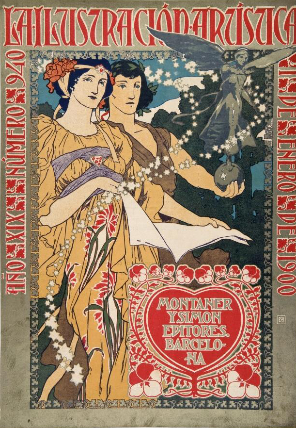 Portada del número 940 de la revista española La Ilustración Artística.